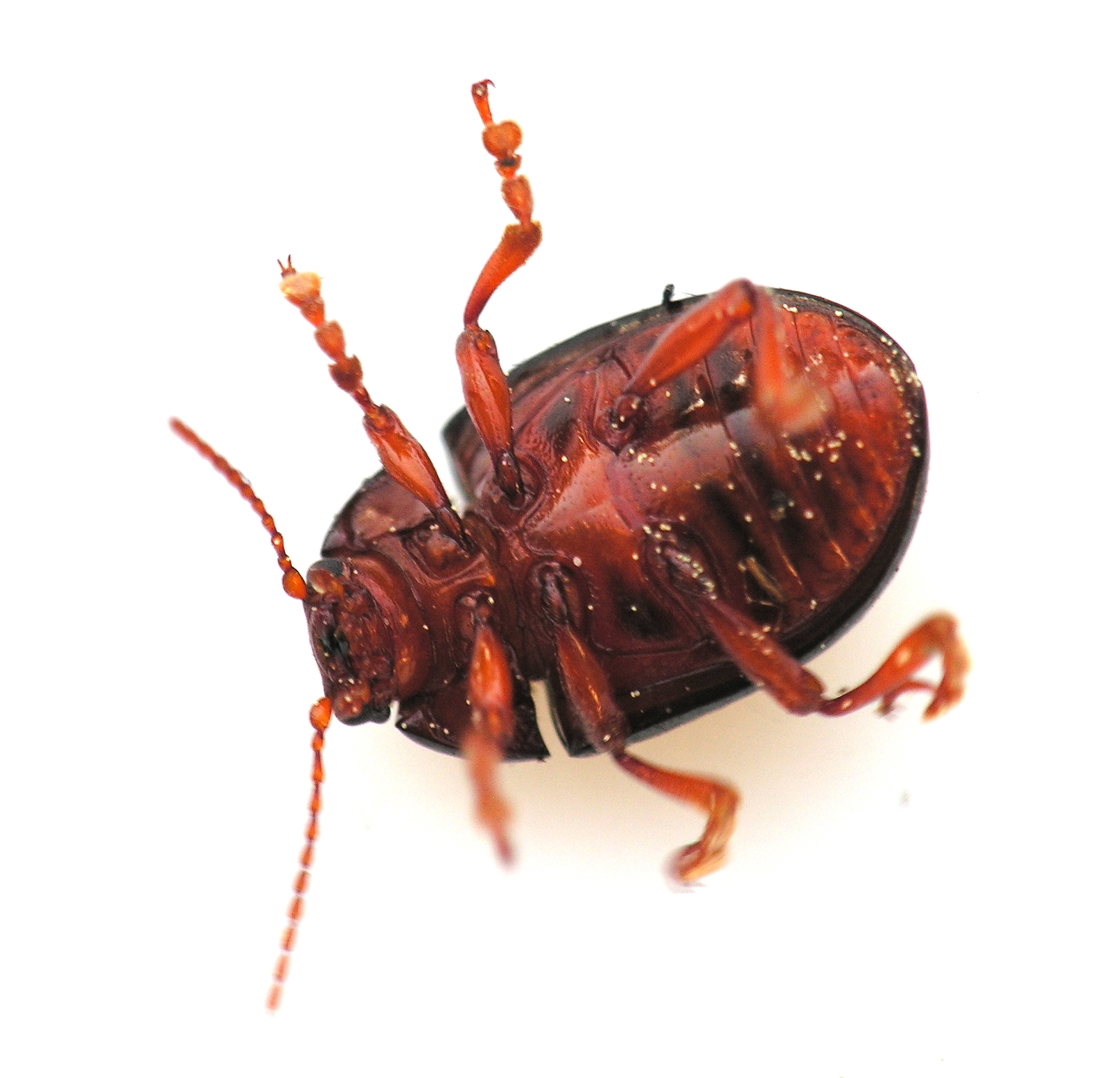 Chrysolina bankii. Escaravello en Bastavales, Brión